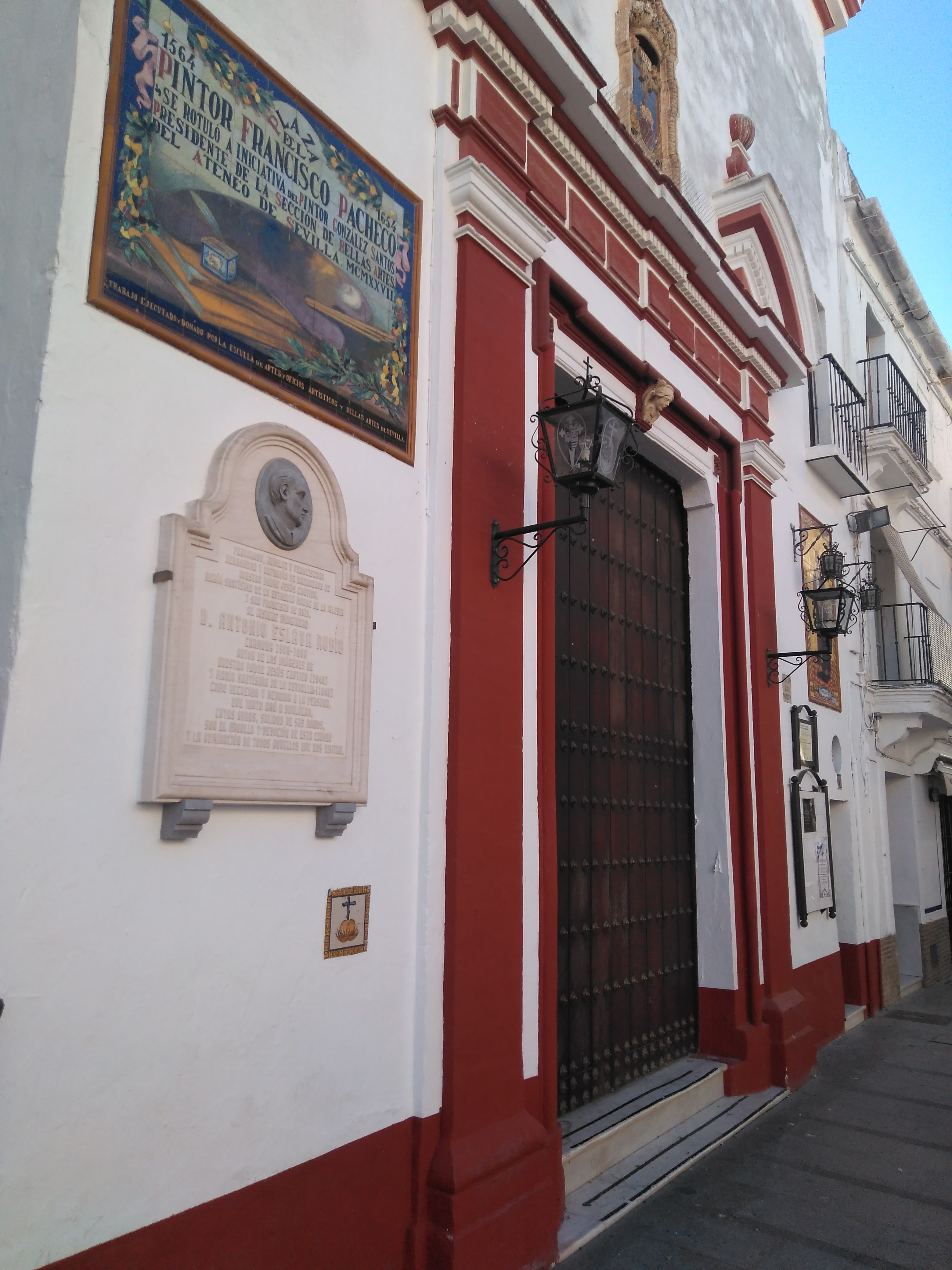 Iglesia de los Desamparados (Sanlúcar de Barrameda, España)